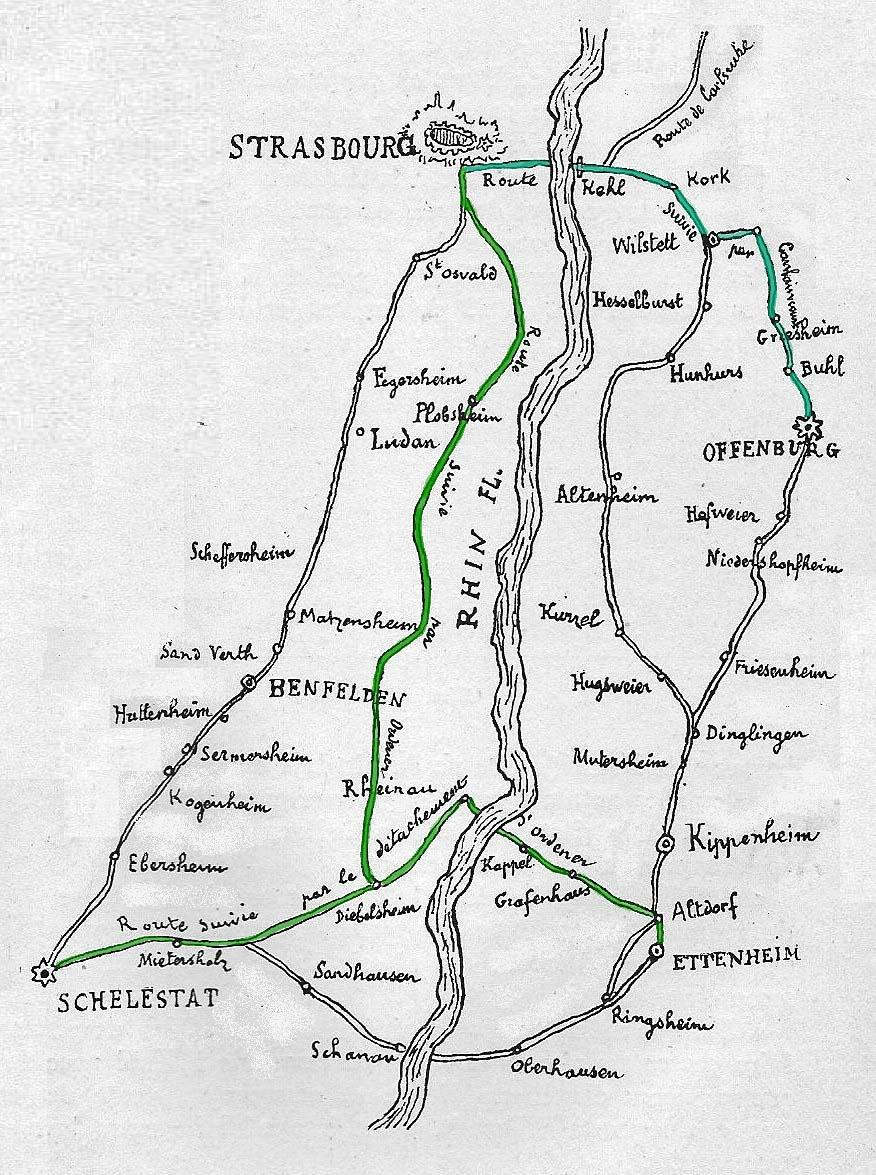 Carte du parcours des agents du Premier consul lors de l'affaire du duc d'Enghien.